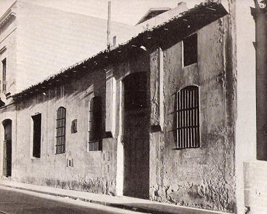 Vista de la casa de la familia Sarratea donde vivió el virrey Santiago de Liniers entre 1808 y 1809. Calle Venezuela nº 469. Monserrat, Buenos Aires.